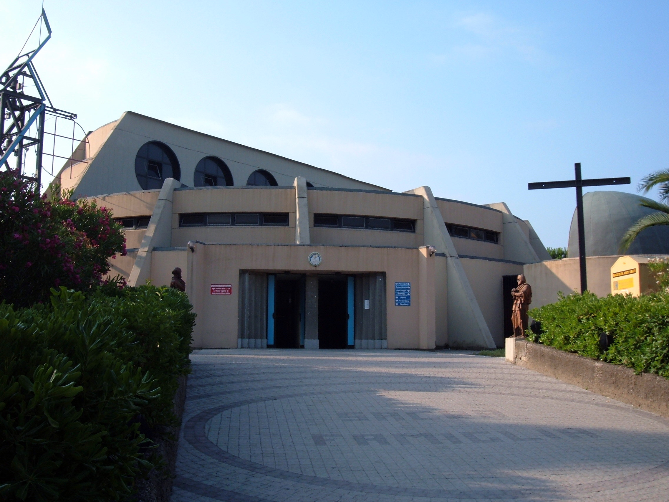 Chiesa della Sacra Famiglia, a Roma, nel quartiere Portuense.